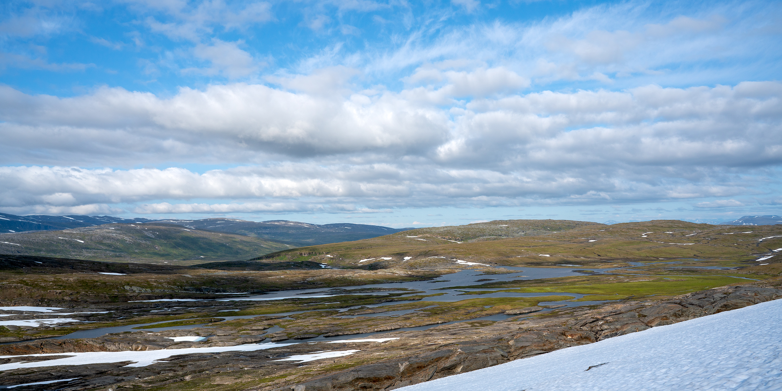 Rástesjávrásj - vy mot nordost.